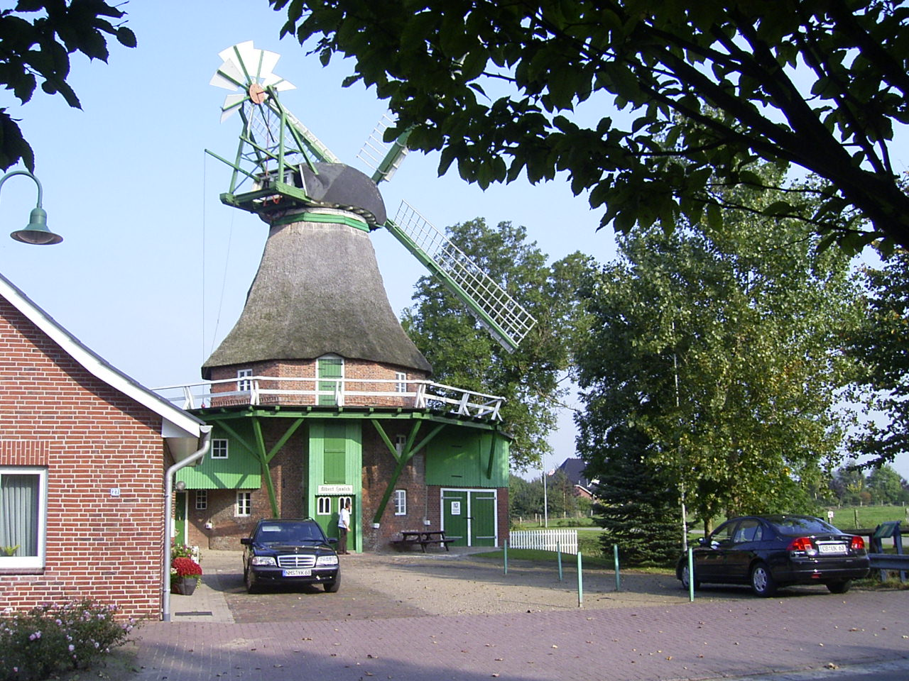 Windmühle "Gott mit uns" (God with us) in Eddelak, erbaut im Jahre/built in 1865, in Betrieb bis /working until 1976